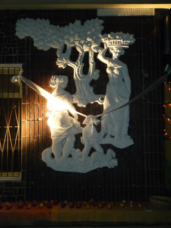 Płaskorzeźba Plon autorstwa Jerzego Jarnuszkiewicza na budynku przy ul. Zwycięzców 11 w Warszawie. Zdjęcie wykonane w dniu odsłonięcia płaskorzeźby po renowacji (2011).